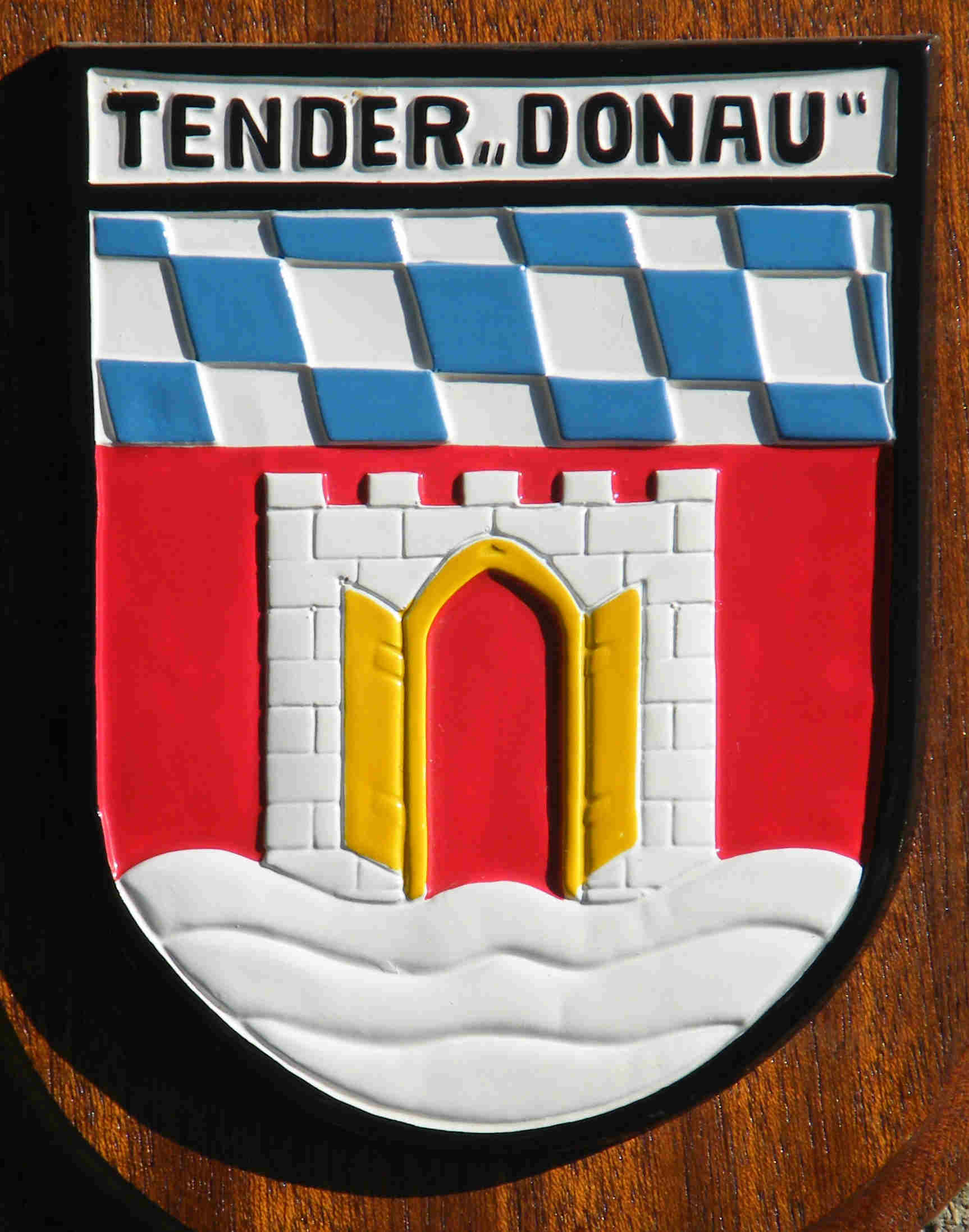 Fotografie des Schiffswappens Tender DONAU A69 der Bundesmarine